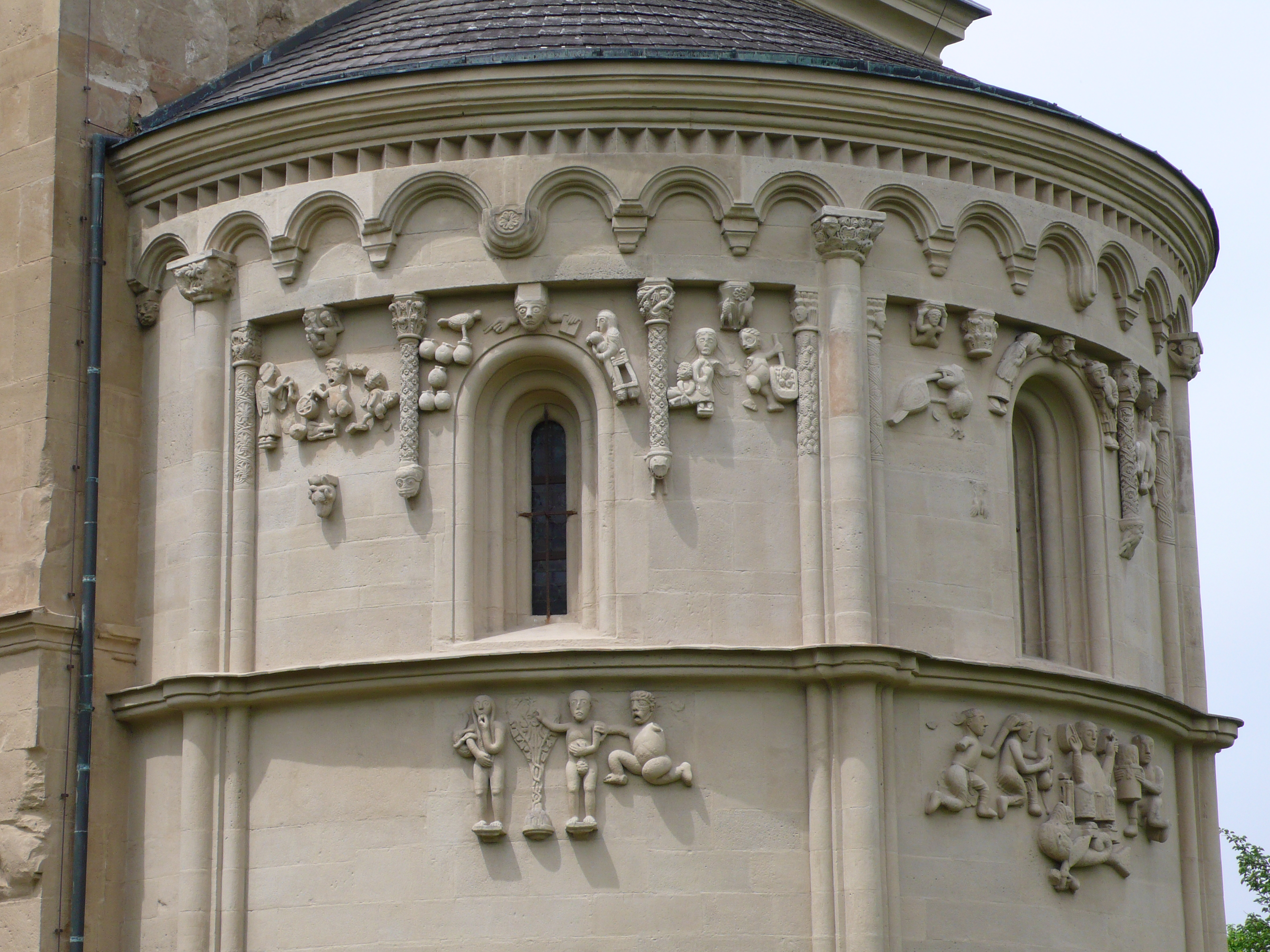 Schöngrabern, Niederösterreich, spätromanische Pfarrkirche, Apsis, Reliefdarstellungen